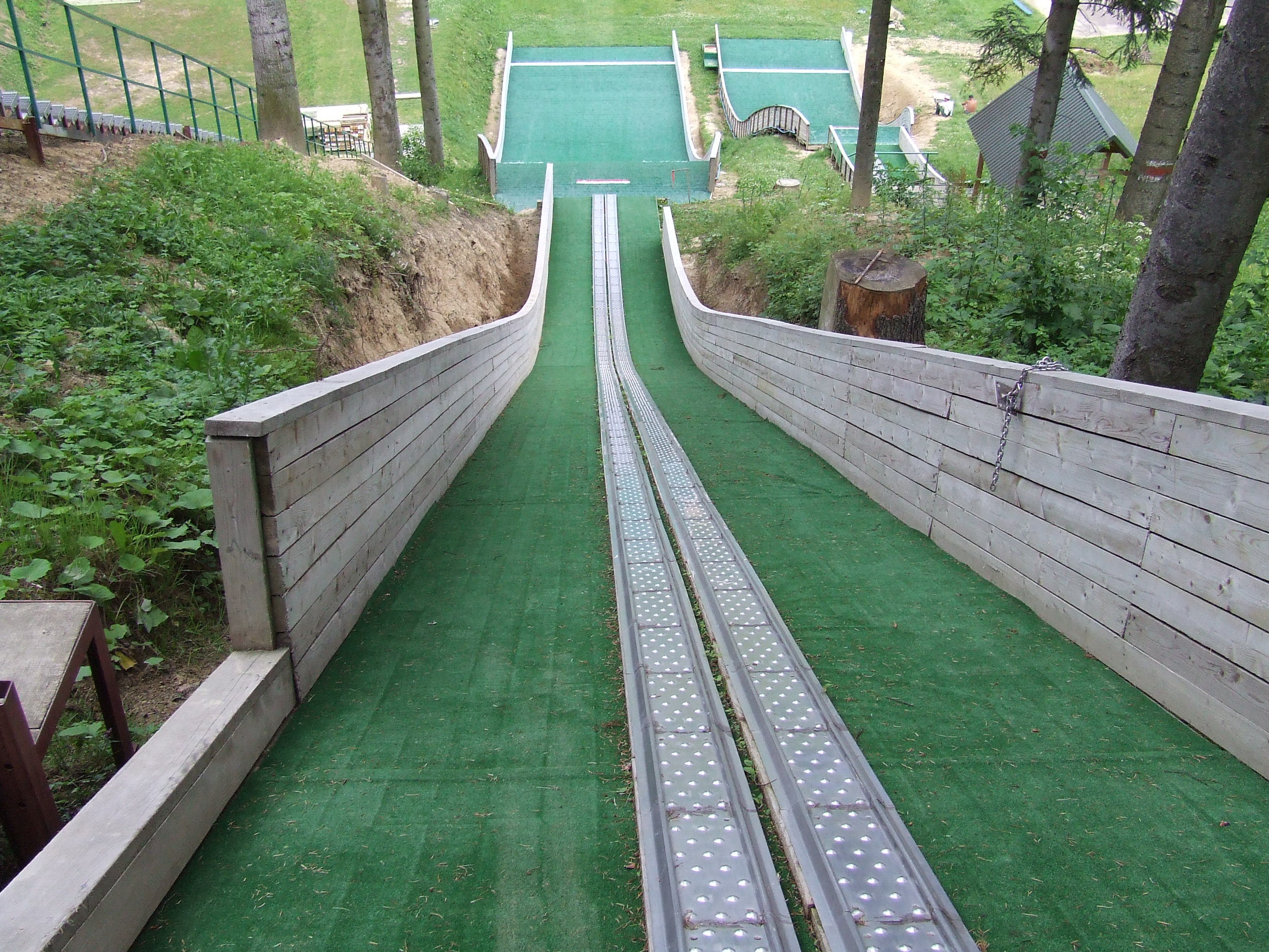 Ski jump Zakucie - Zagórz, Poland